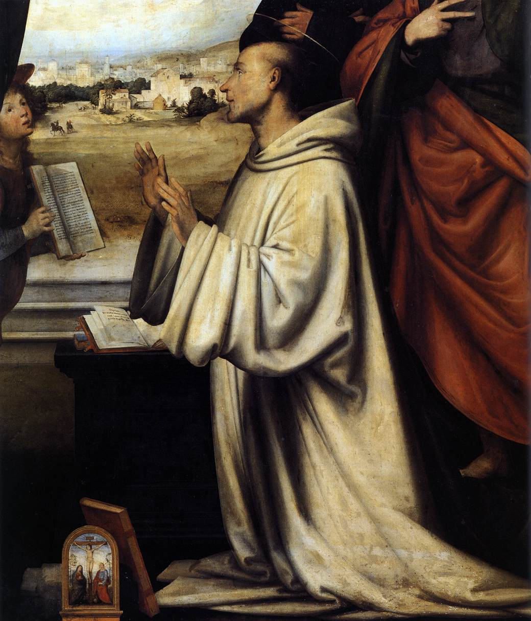 detail